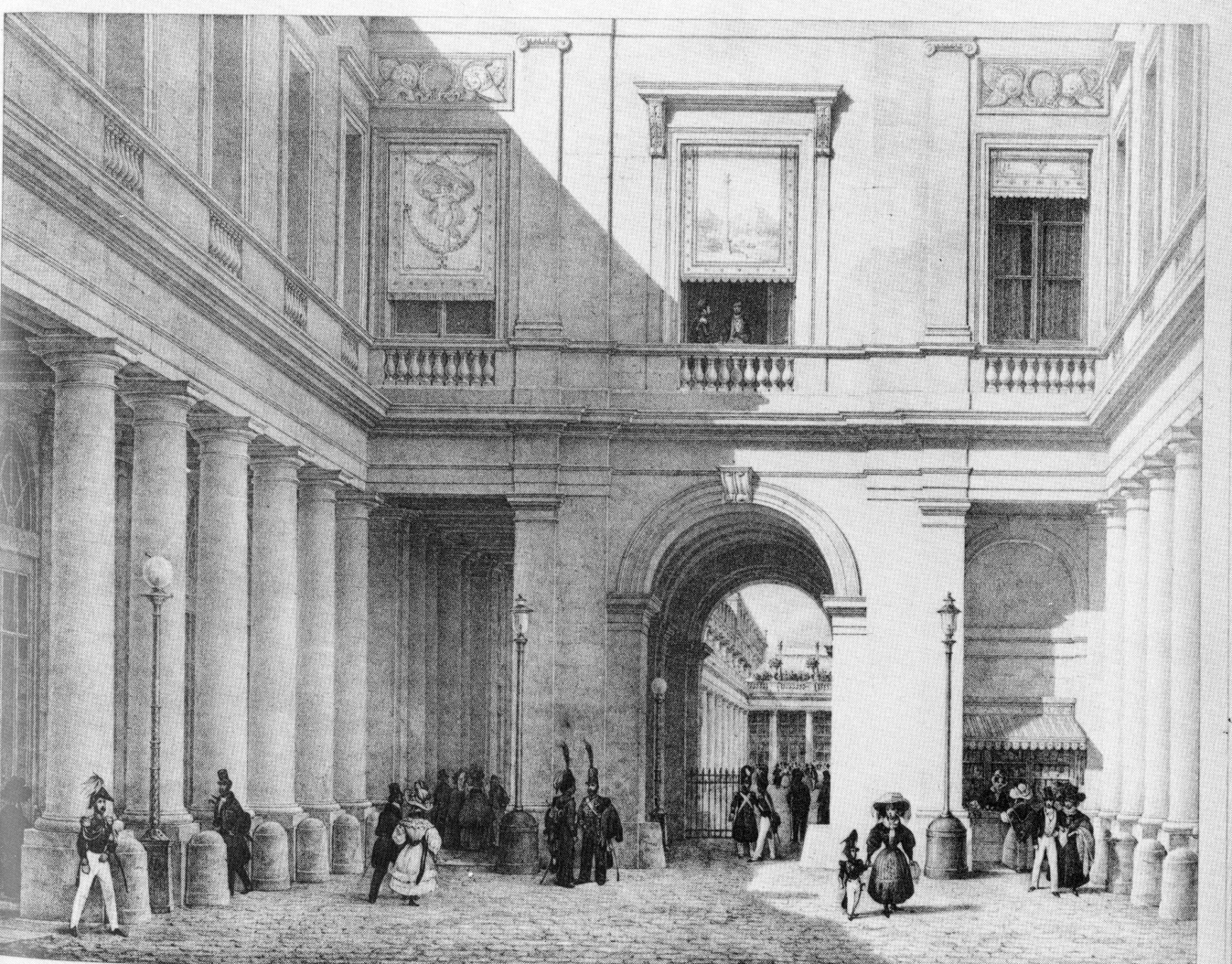 Vue de la cour de Nemours au Palais-Royal vers 1840 d'après l'architecte Fontaine.